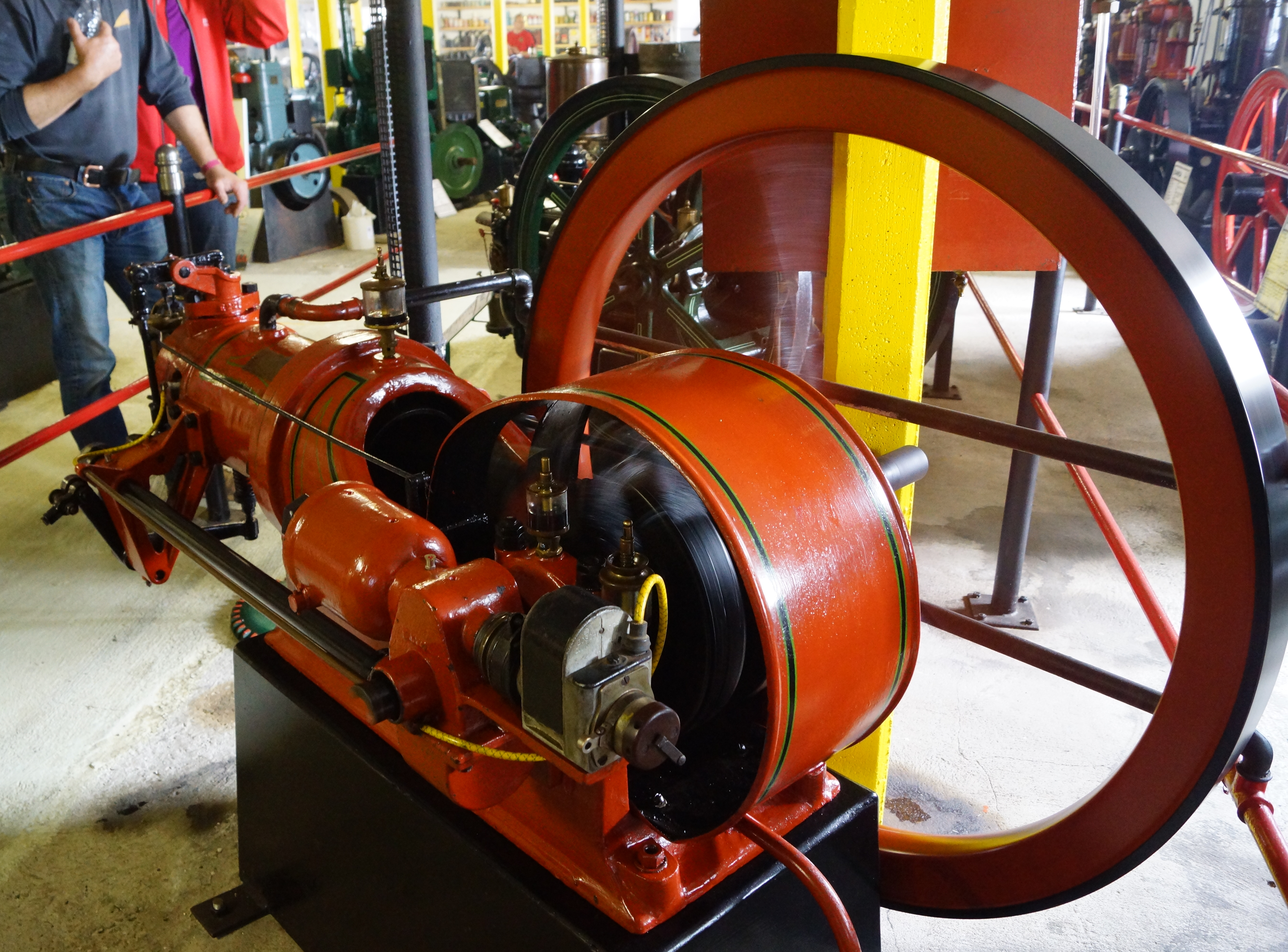 Holstebro motor